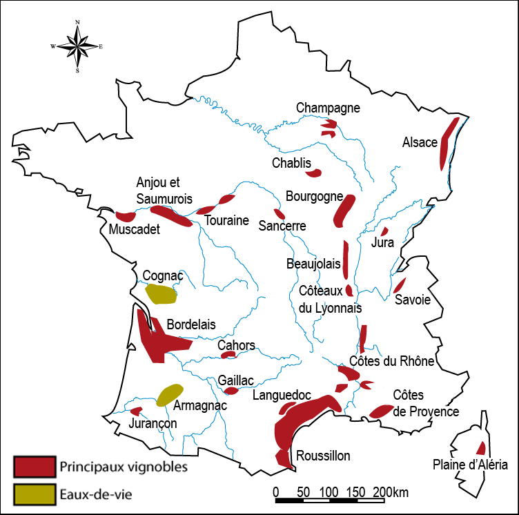 Les principaux vignobles de France